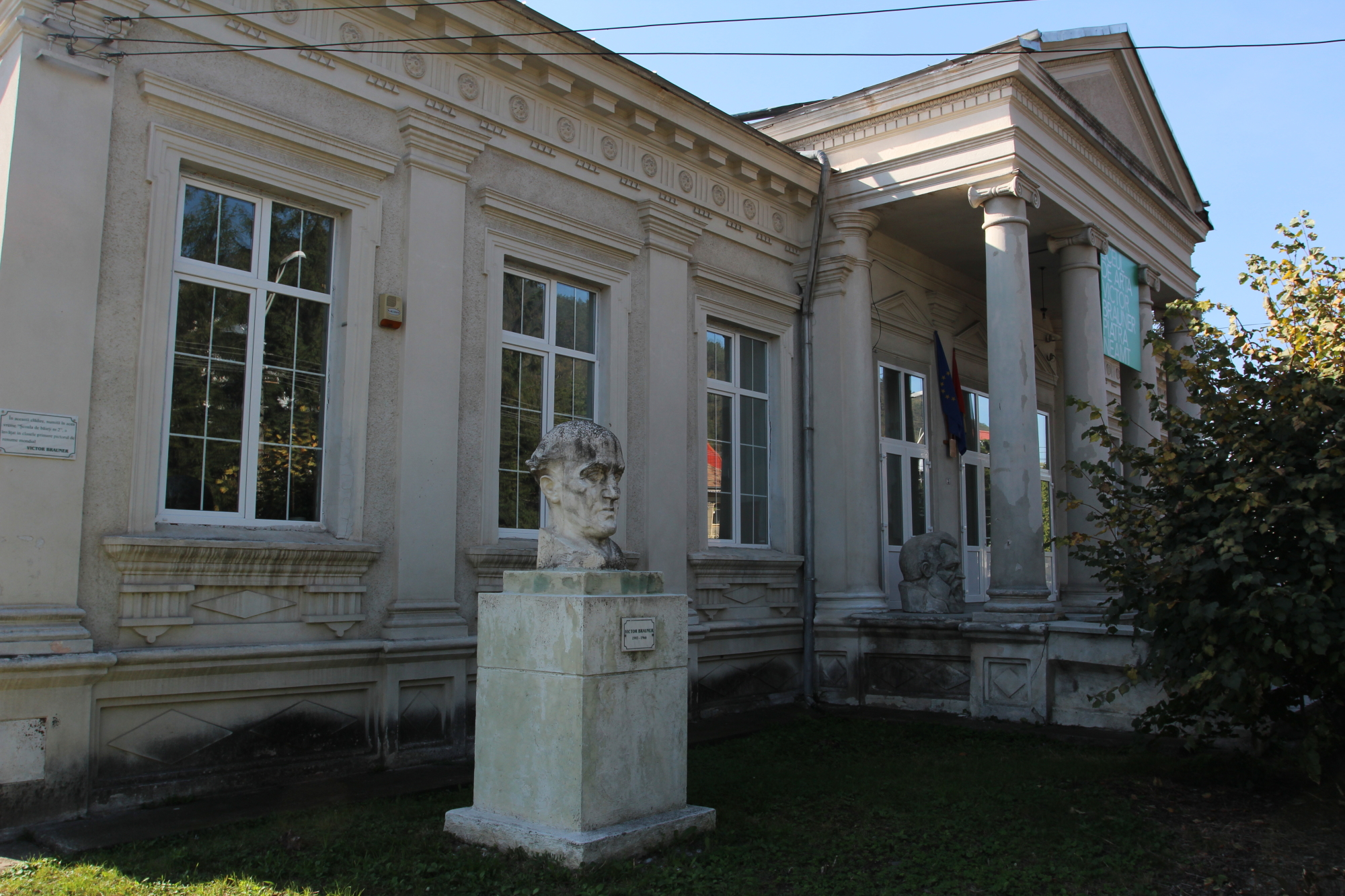 Liceul de Artă